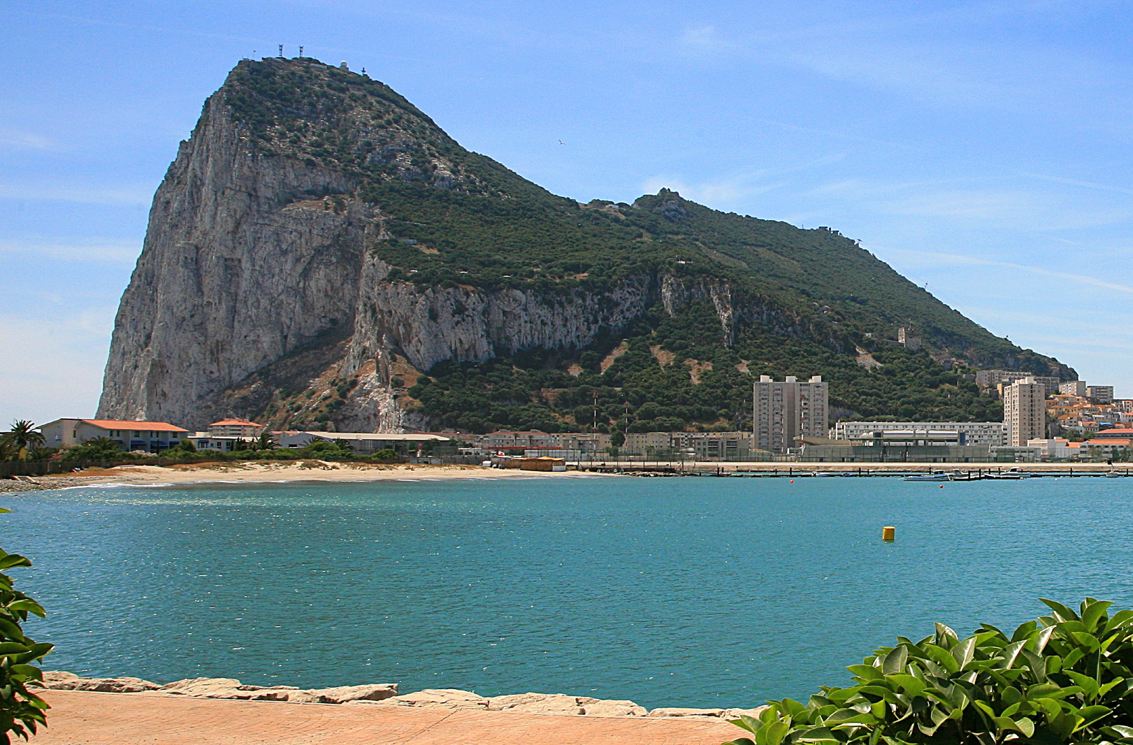 Gibraltar